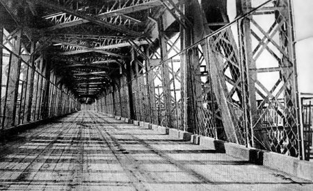 Нижний ярус Кичкасского моста